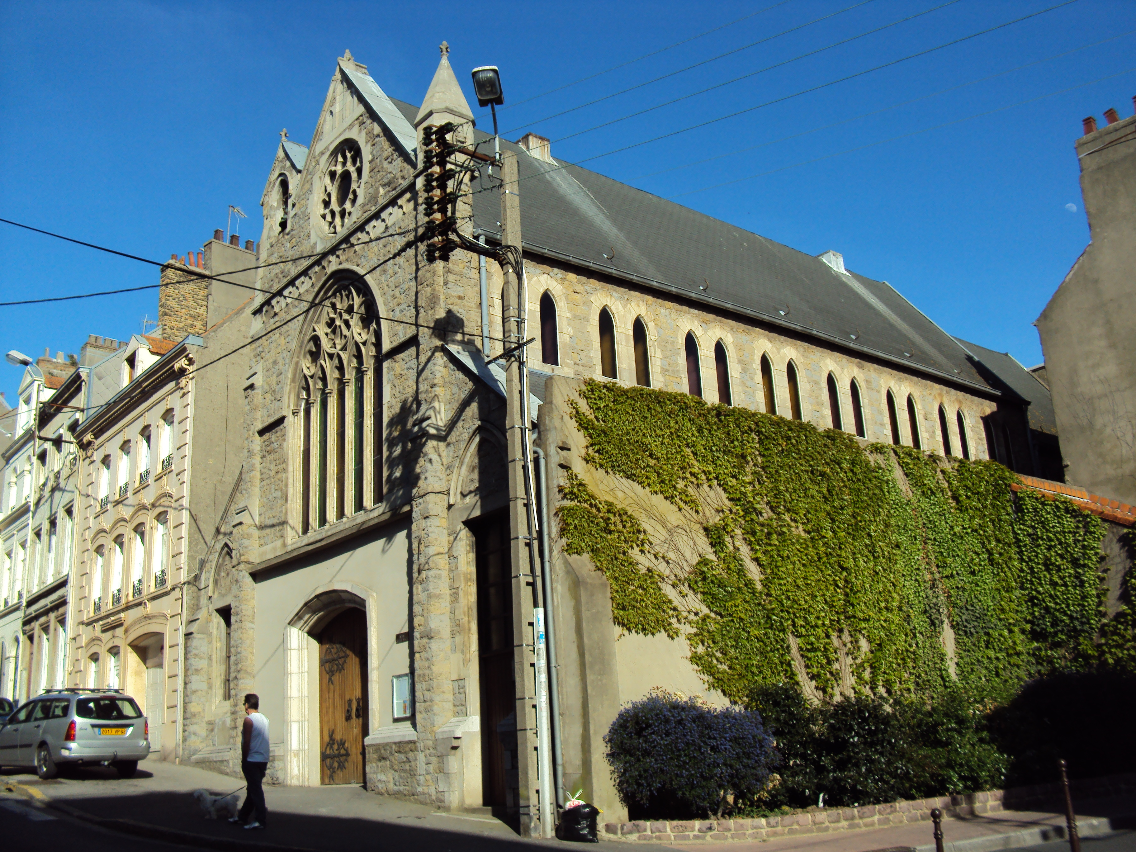 Église Saint-Louis à Boulogne (France)